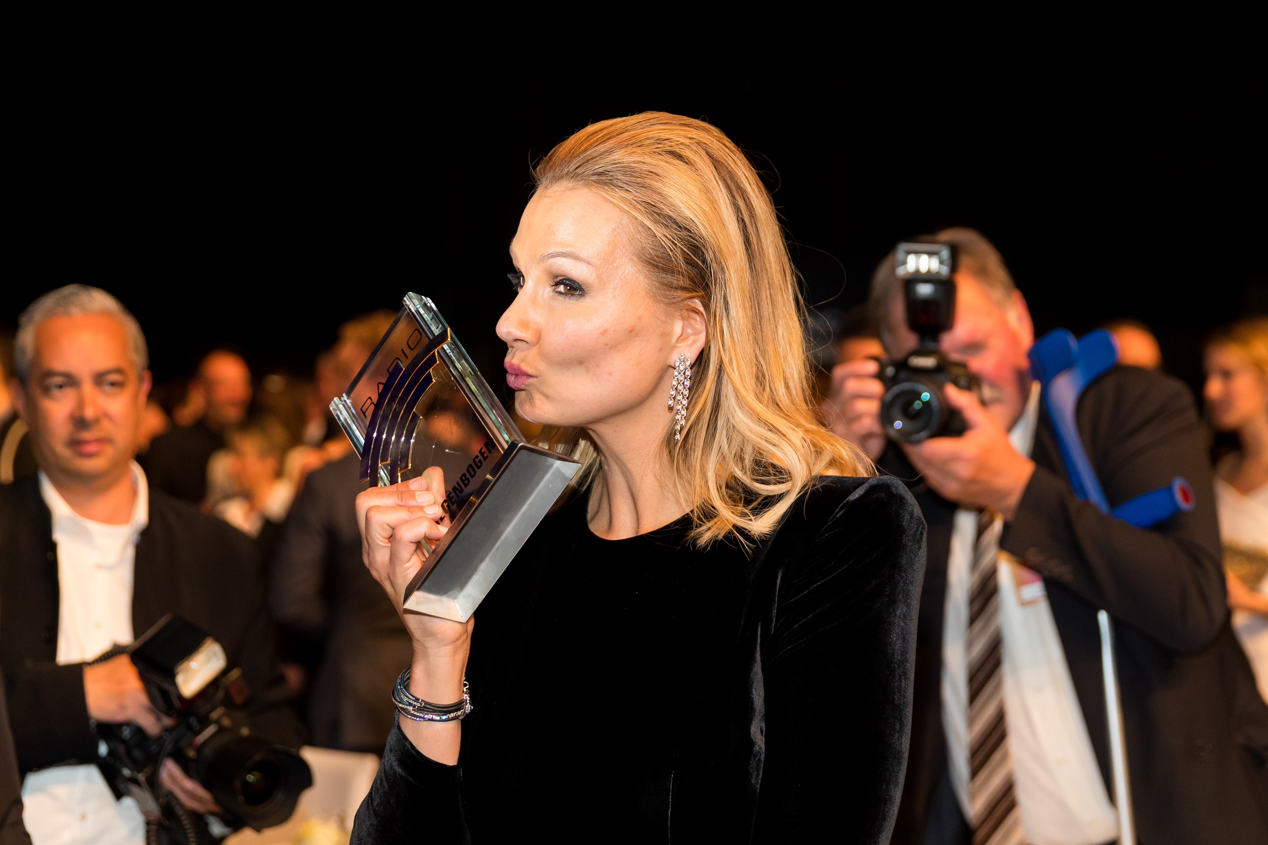 Franziska van Almsick during Radio Regenbogen Award 2019 at Europapark, Rust, Baden-Württemberg, Germany on 2019-04-12, Photo: Sven Mandel